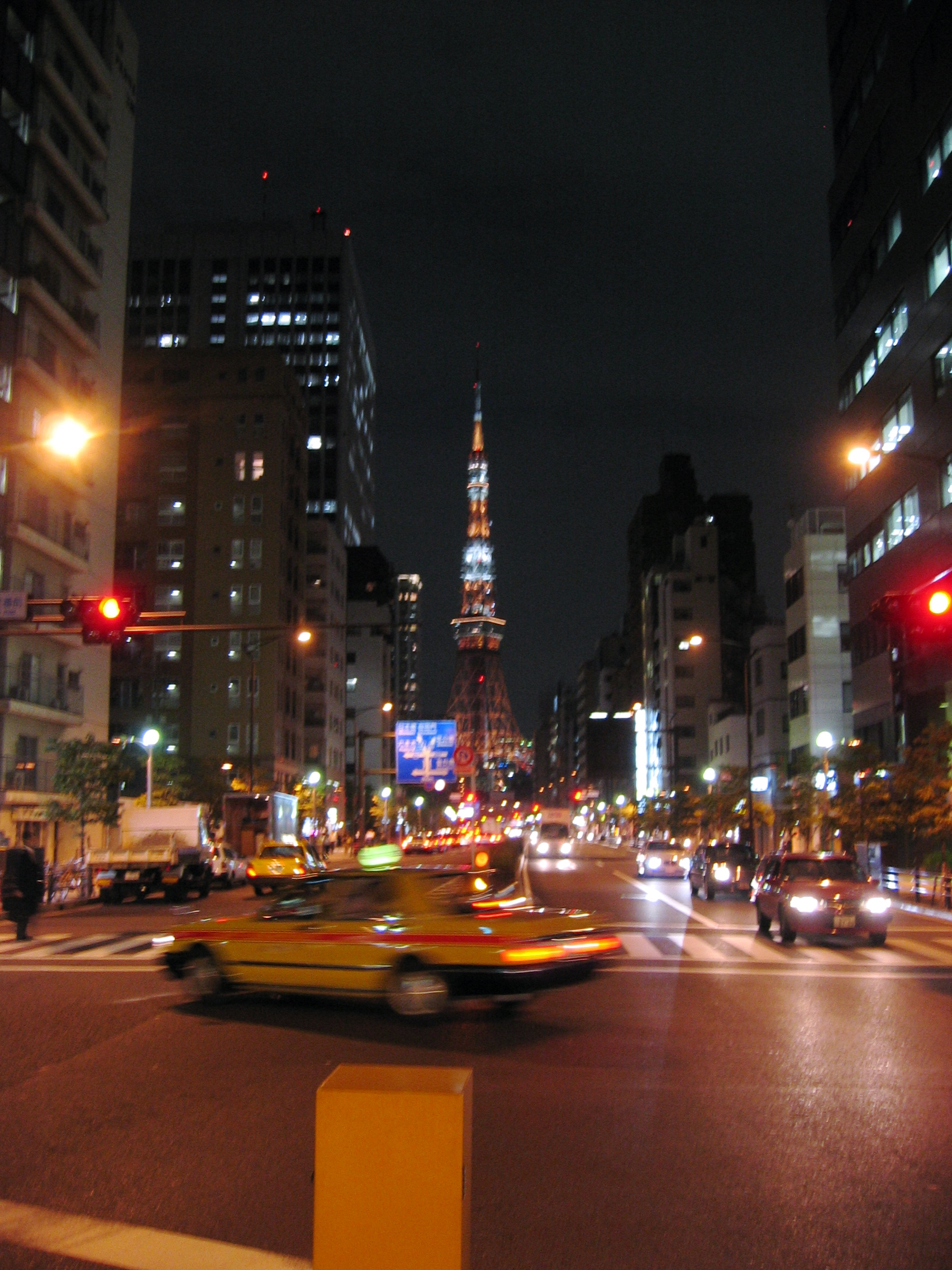 Tokyo Tower from Sakurada-dori in Shiba, Minato-ku, Tokyo